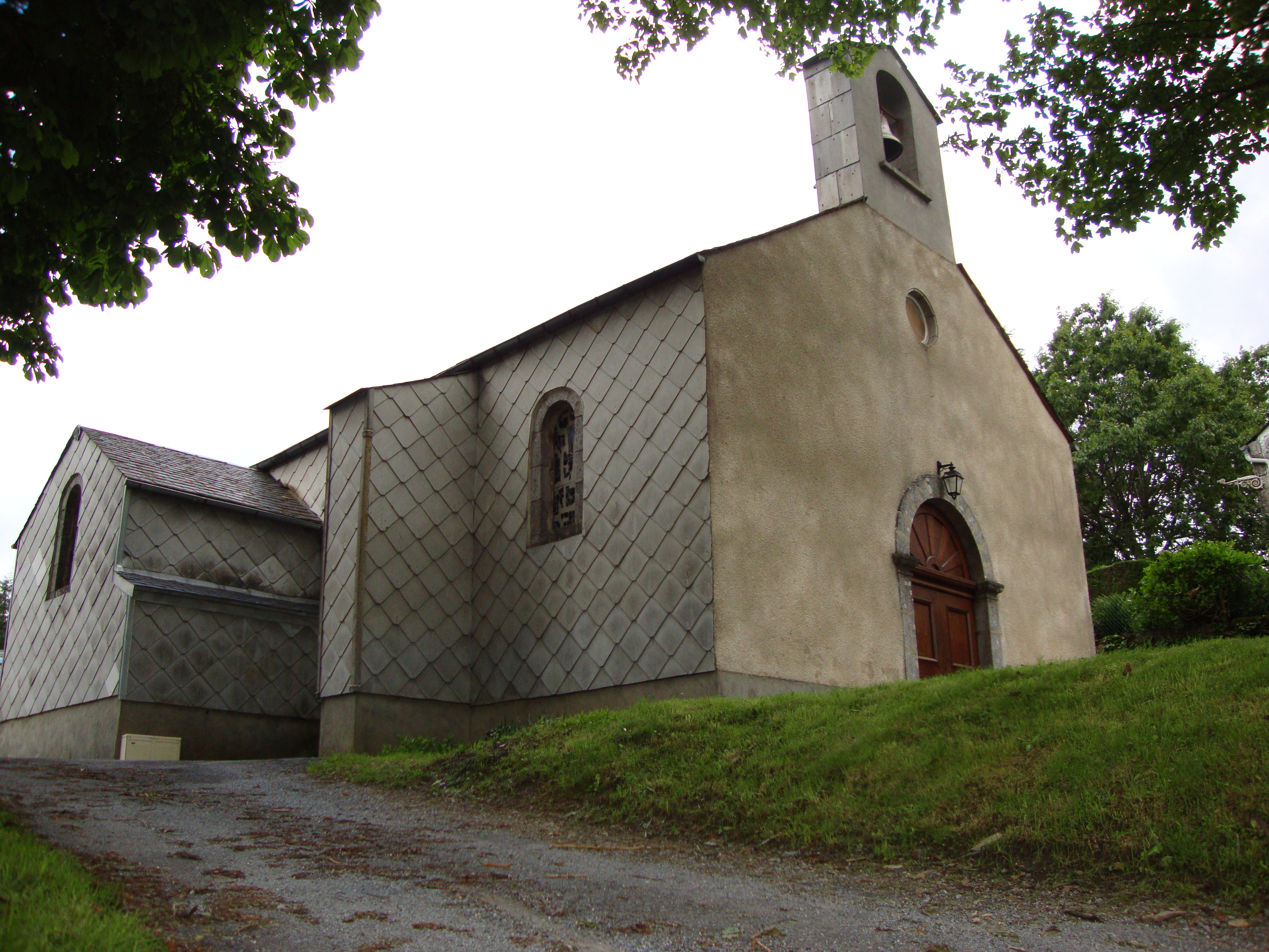 Bouisset (Lasfaillades, Tarn, Fr) église